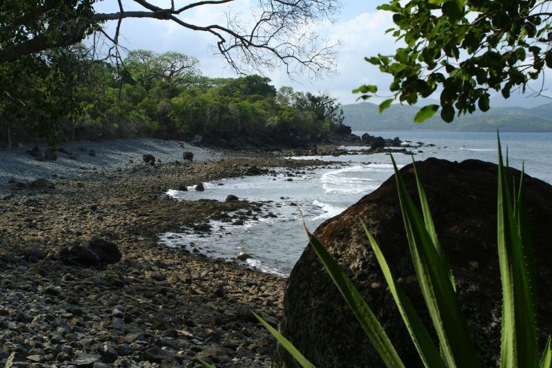 Plage de galets de la pointe Saziley, à Mayotte